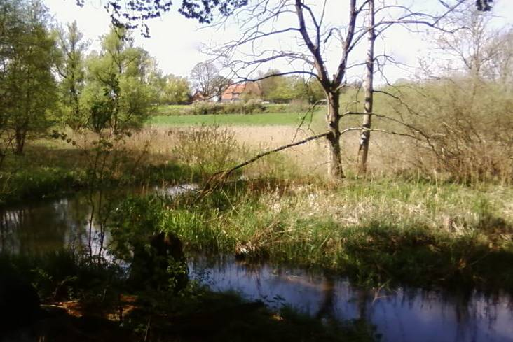 Radegast bei Holdorf.